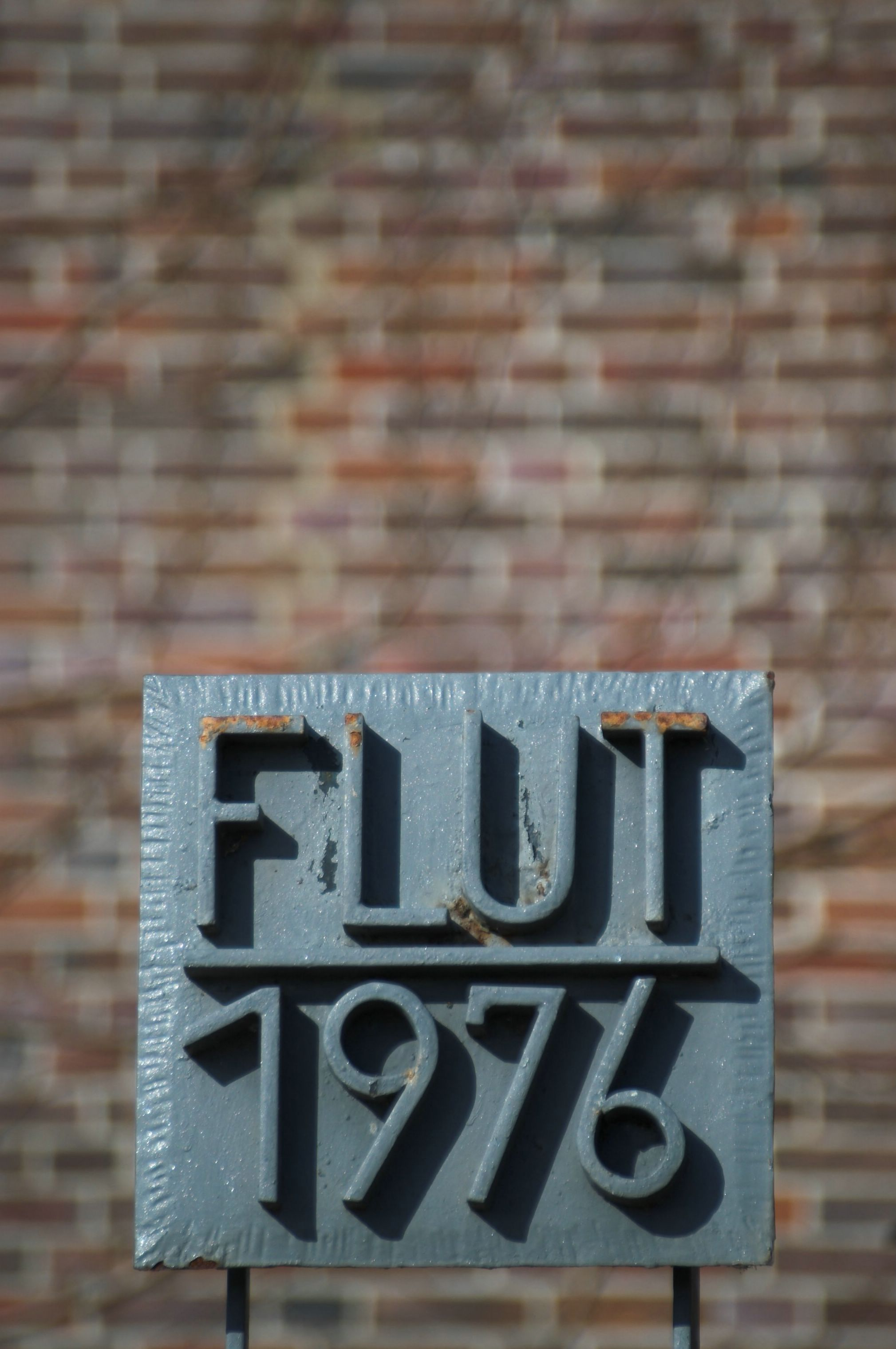 Flood height marker of 1976 storm surge in Blankenese, Hamburg.